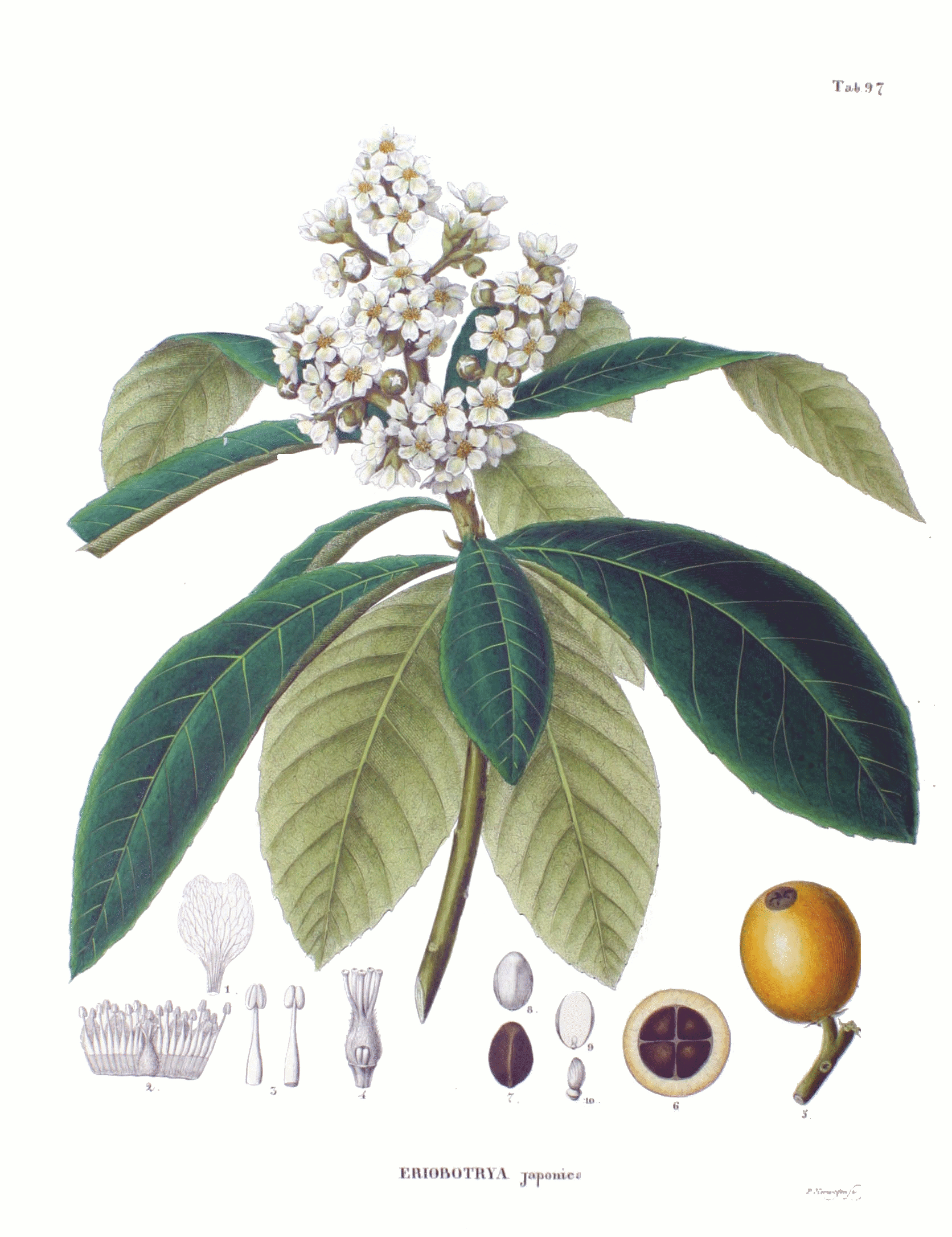 Eryobotrya japonica - 1: Pétalo; 2: Cáliz abierto con estambres, 3: Estambre: vistas ventral y dorsal; 4: Pístilo con lóculo abierto y óvulo visible; 5: Pomo; 6: Pomo en corte tranversal; 7: Semilla; 8: Semilla sin testa; 9: Cotiledón; 10: Embrión.